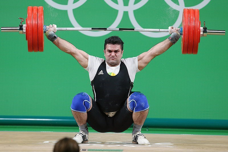 Weightlifting at the 2016 Summer Olympics – Men's 105 kg